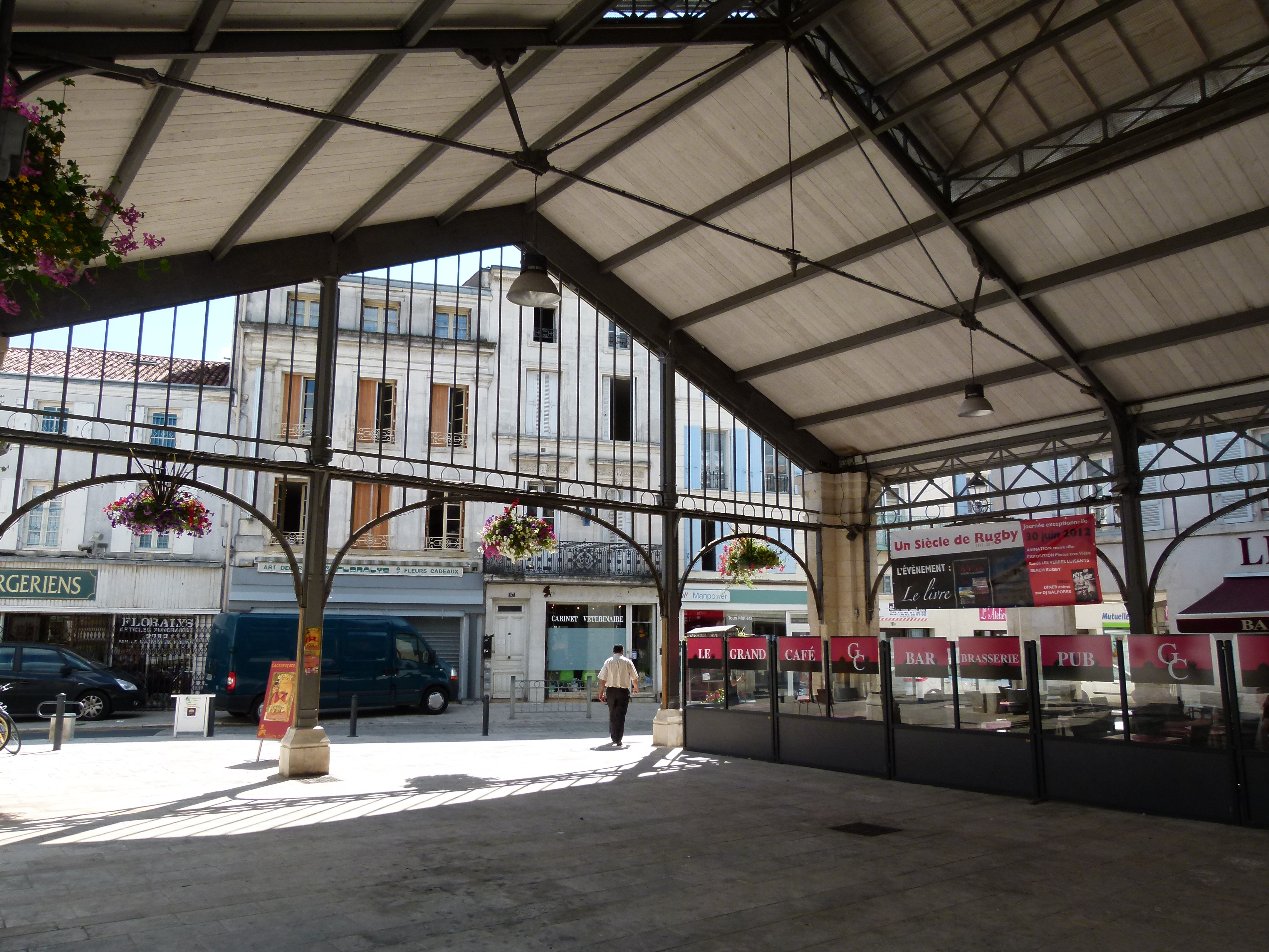 Les halles de Surgères ont été construites en 1842 mais ont connu une profonde rénovation en 2001.